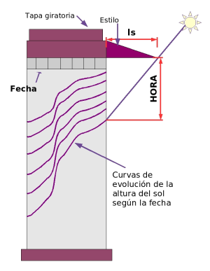 Reloj de Pastor RPLl2006